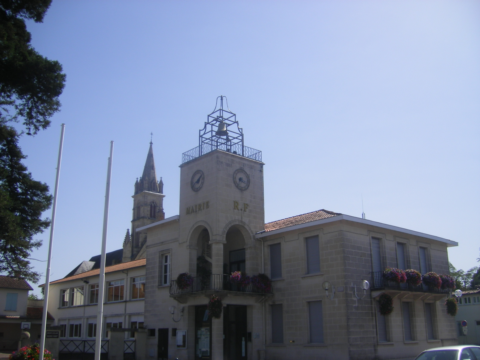 Marcheprime : mairie et église à l'arrière plan